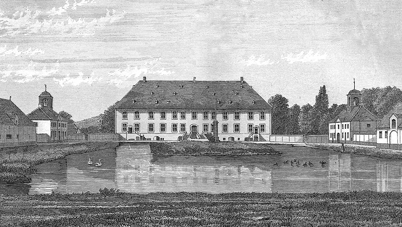 Valdemars Slot på Tåsinge ved Svendborg blev bygget af Kong Christian 4. i årene fra 1639 til 1644 til sønnen Valdemar Christian. I 1677 erhvervede søhelten Niels Juel Tåsinge og slottet for den indtægt, som sejren i Søslaget i Køge Bugt indbragte ham. Han restaurerede slottet, som stadig er i Juel-slægtens eje.